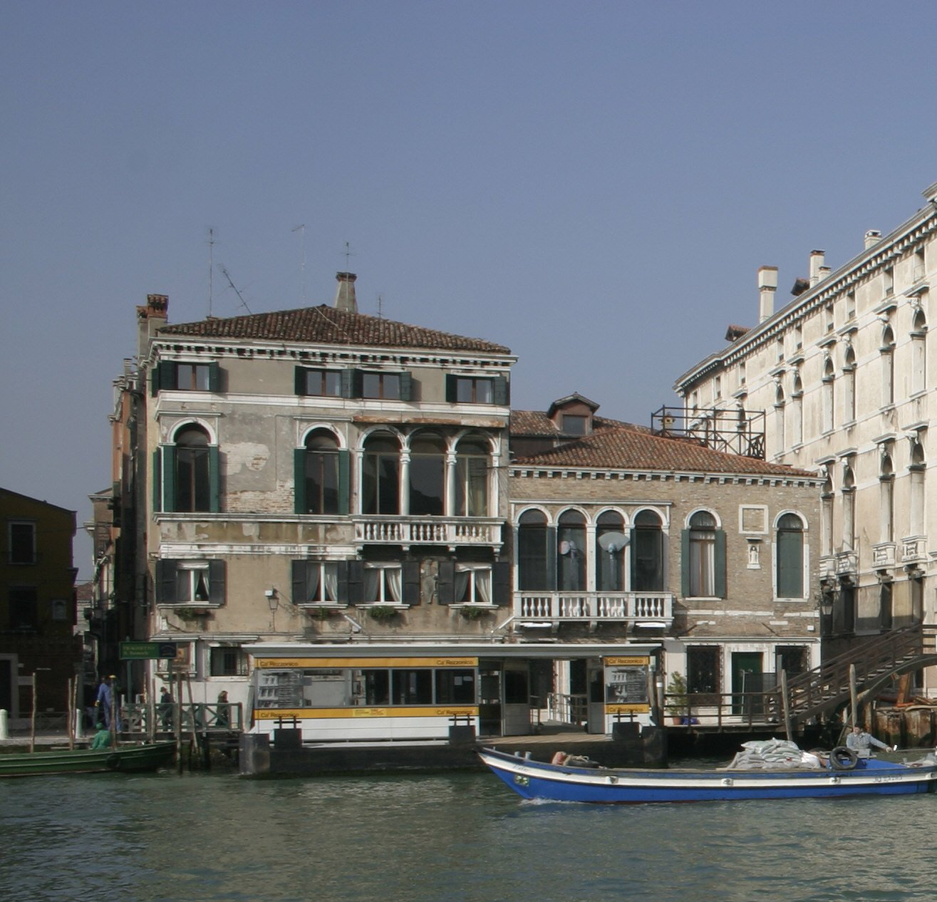 Palais Contarini Michiel